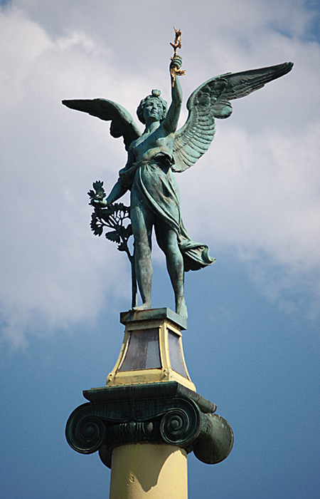 Výzdoba Čechova mostu v Praze